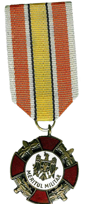 Медаль Республики Молдова «Meritul Militar»